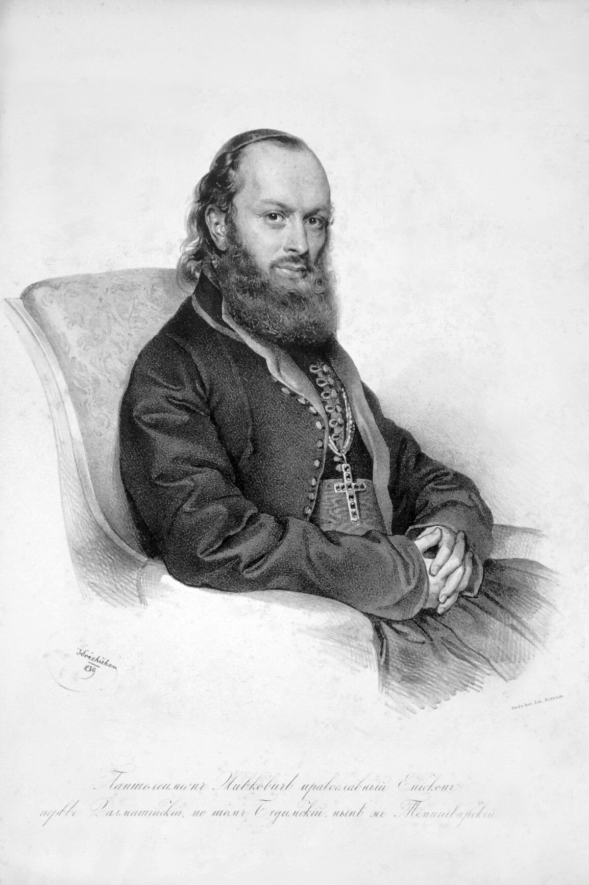 Panteleimon Zivkowic (1795-1871). 1835 Bischof von Dalmatien, 1836 Bischof von Ofen, seit 1841 griechisch-unierter Bischof von Temesvar. Lithographie von Josef Kriehuber, 1839